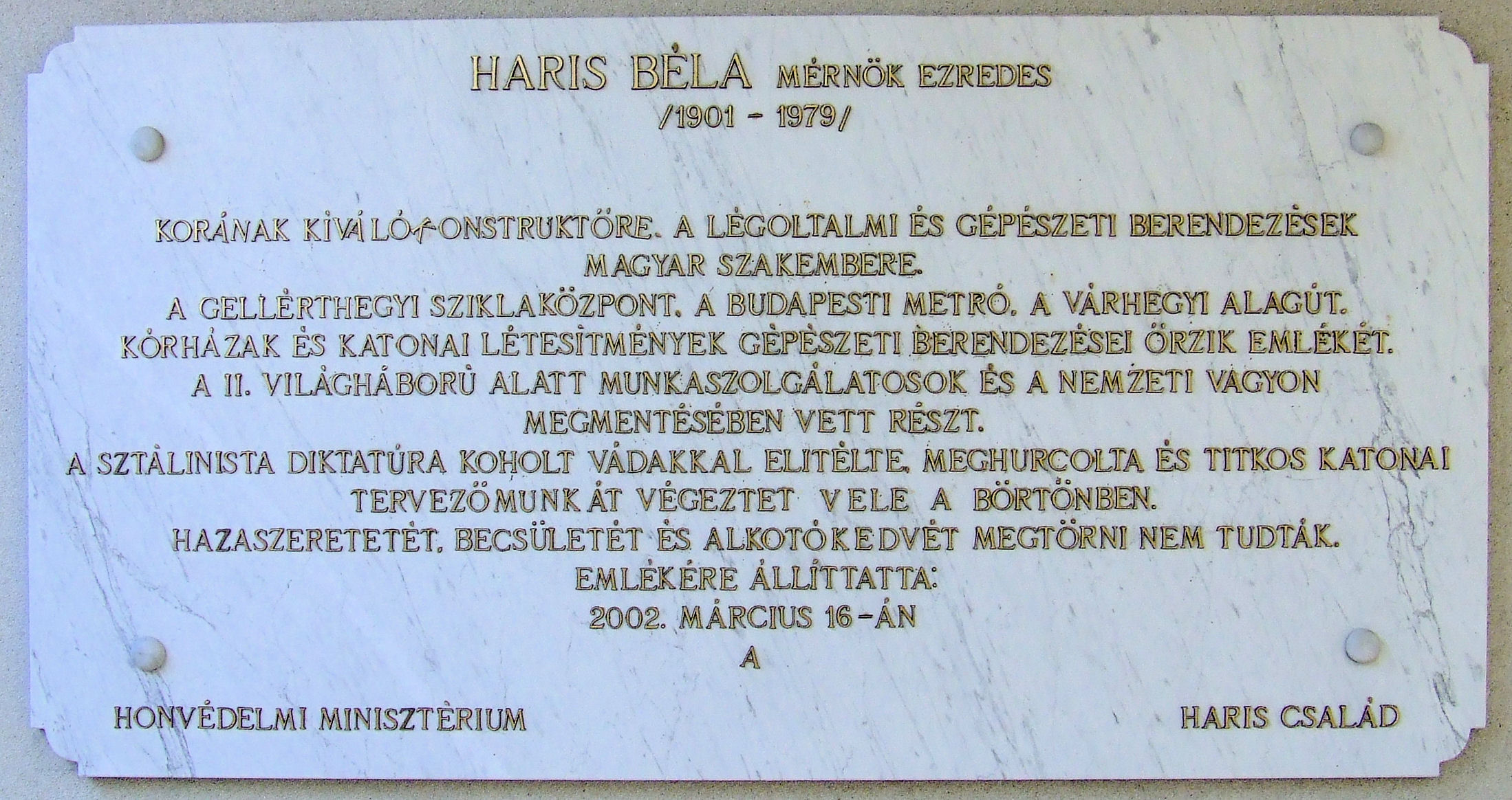 Haris Béla (1901–1979) honvédtiszt emléktáblája a keceli hadtörténeti parkban